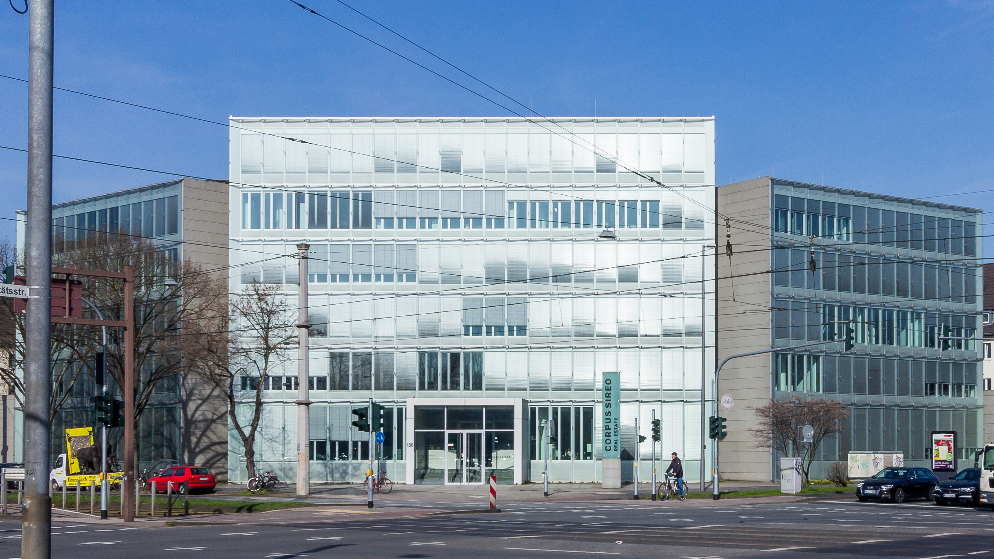 Bürohaus Aachener Straße 186, Köln. Sitz der CORPUS SIREO Real Estate GmbH